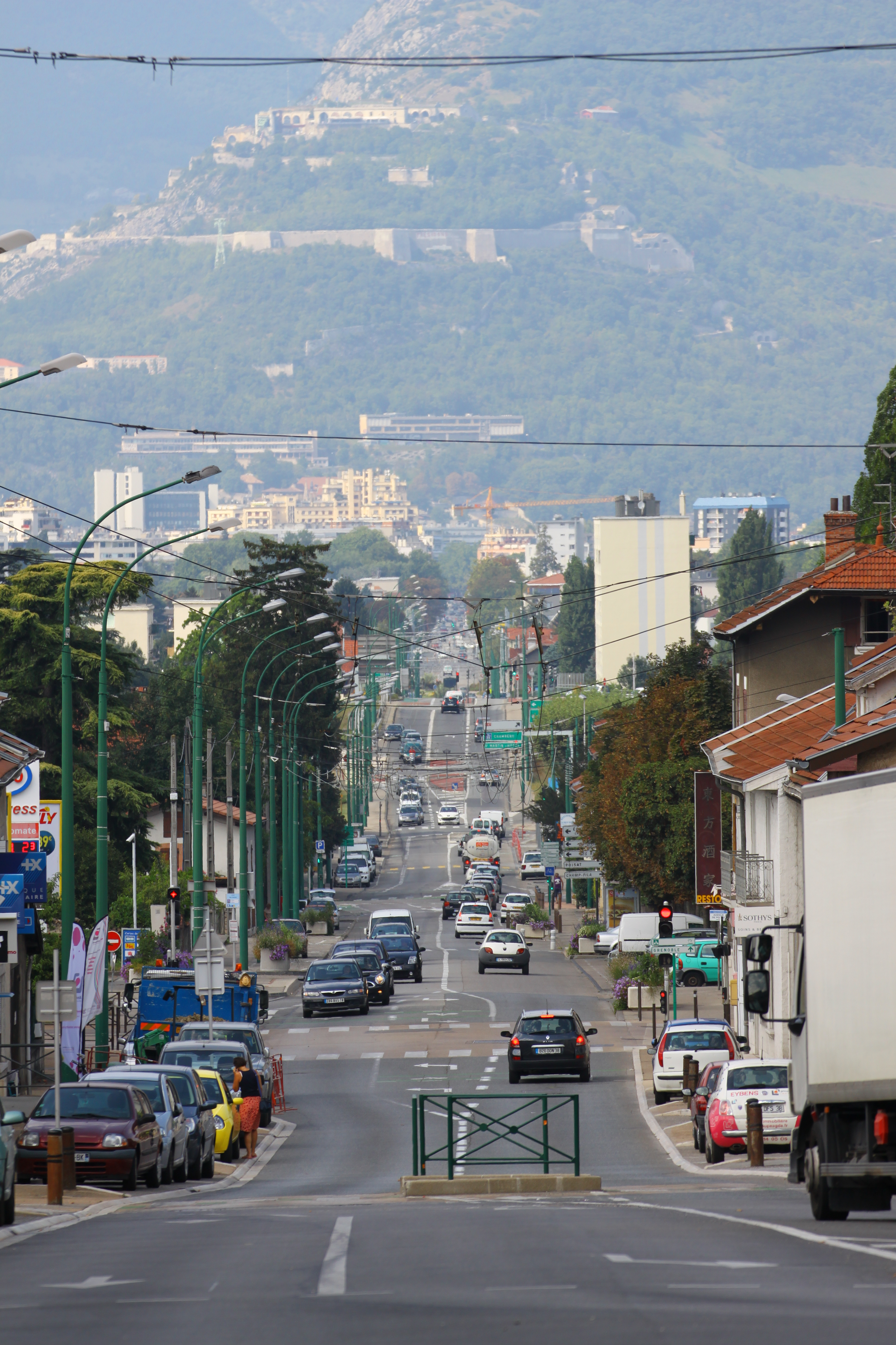 L'avenue Jean Jaures à Eybens, prolongé ensuite par l'avenue Jean Perrot à Grenoble.